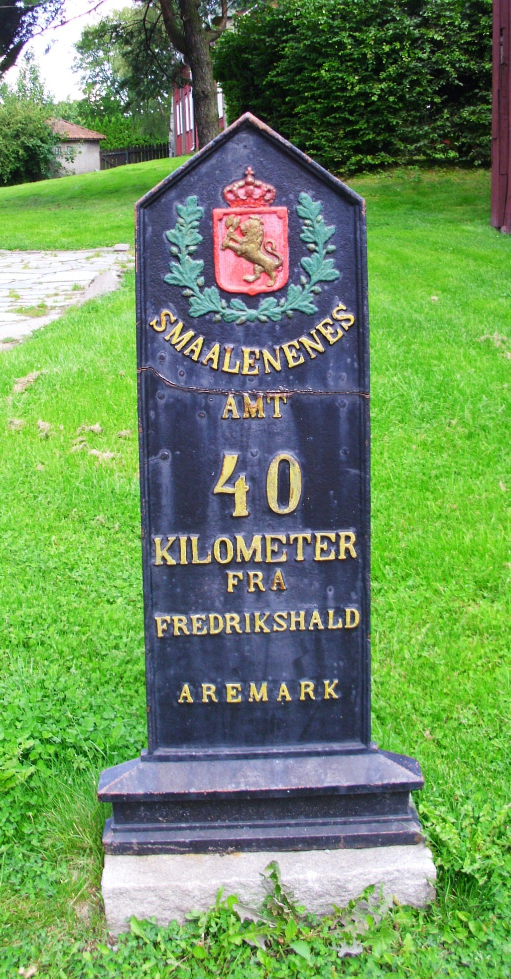 Historischer Kilometerstein in der Provinz "Smaalenes Amt" (heute Østfold) im Museumspark Borgarsyssel Sarpsborg